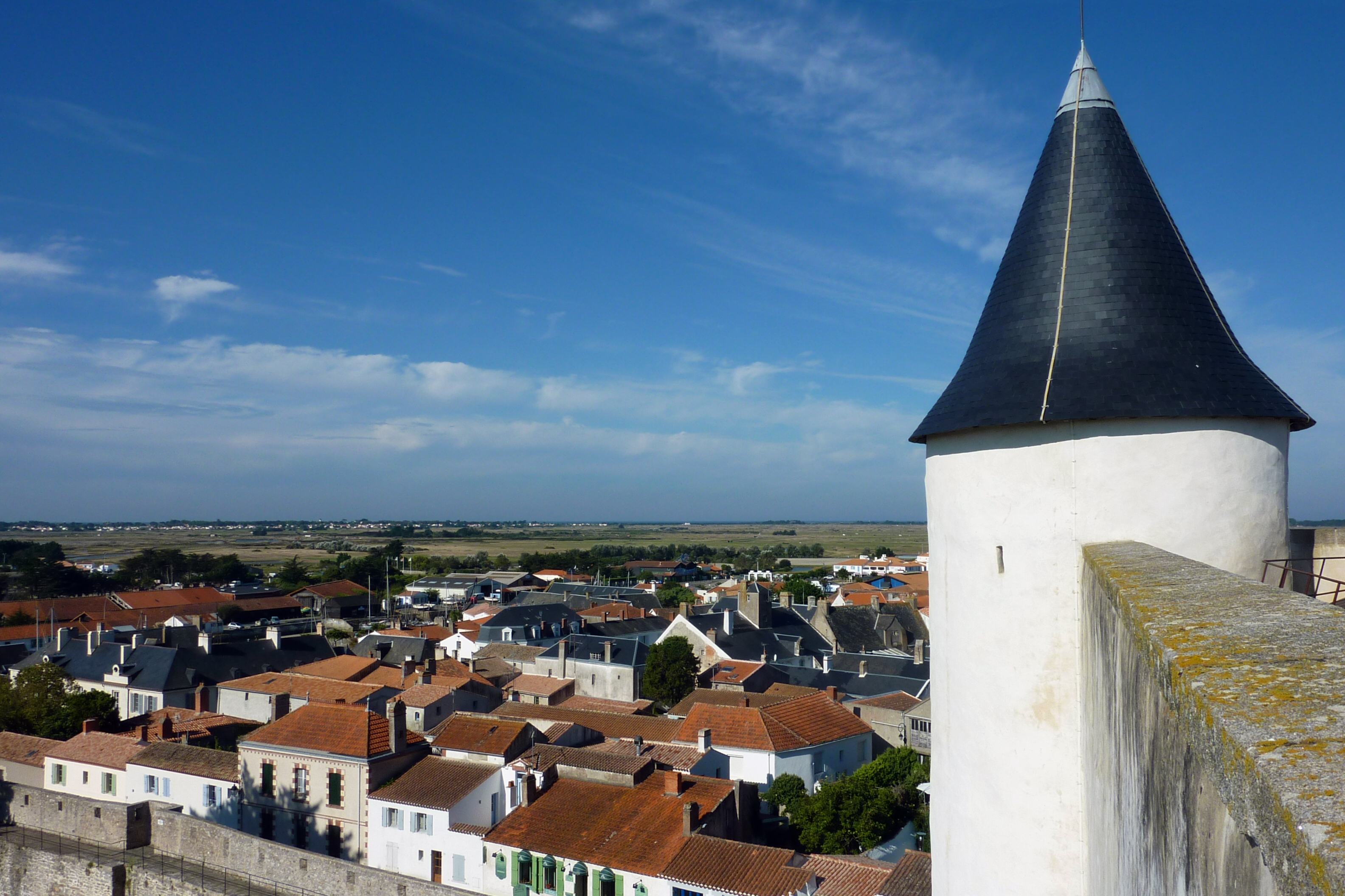 Tour du donjon du château et vue sur la ville Noirmoutier Vendée France